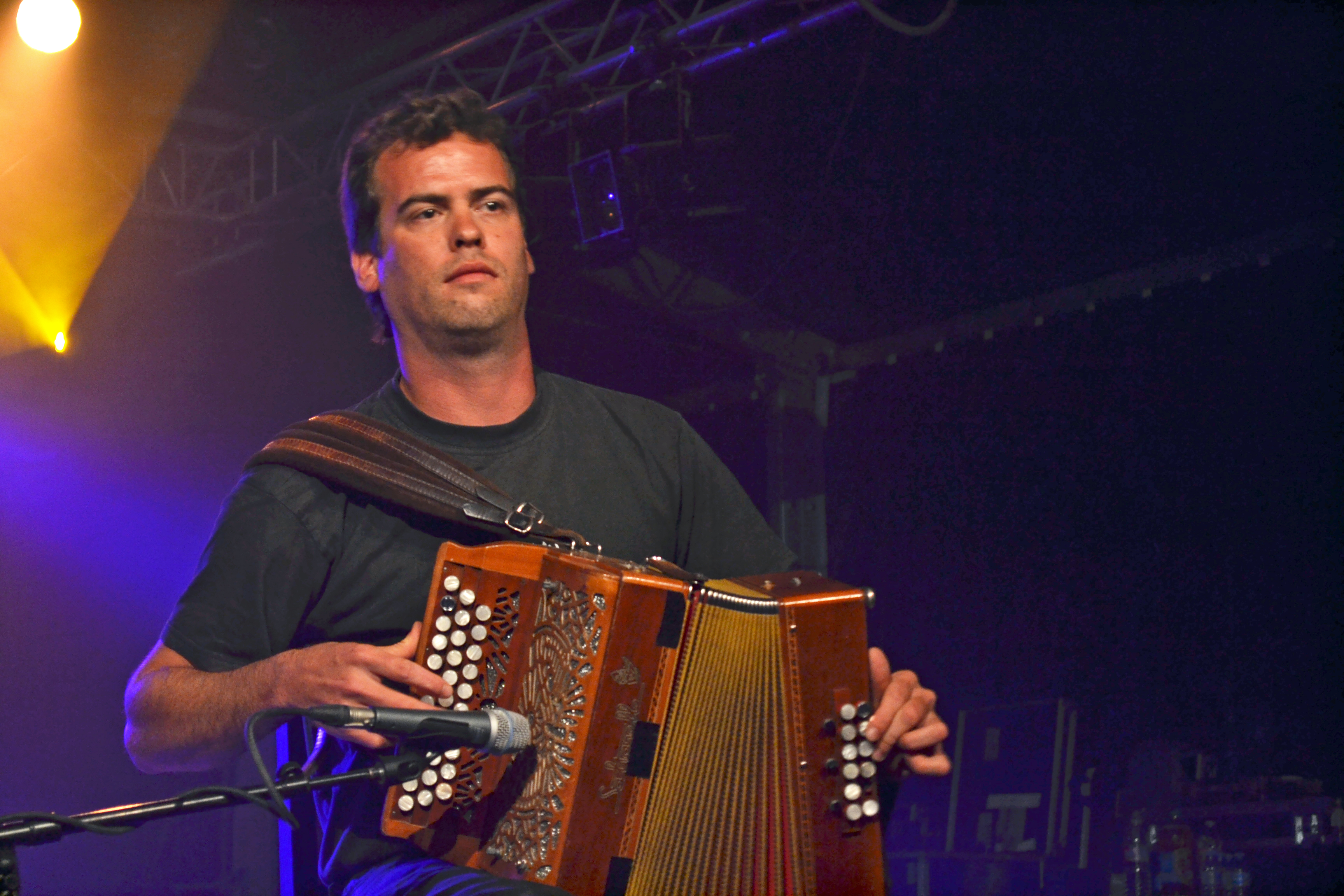 Loig Troël à l'accordéon diatonique au fest-noz du festival Kann Al Loar à Landerneau le 13 juillet 2015.